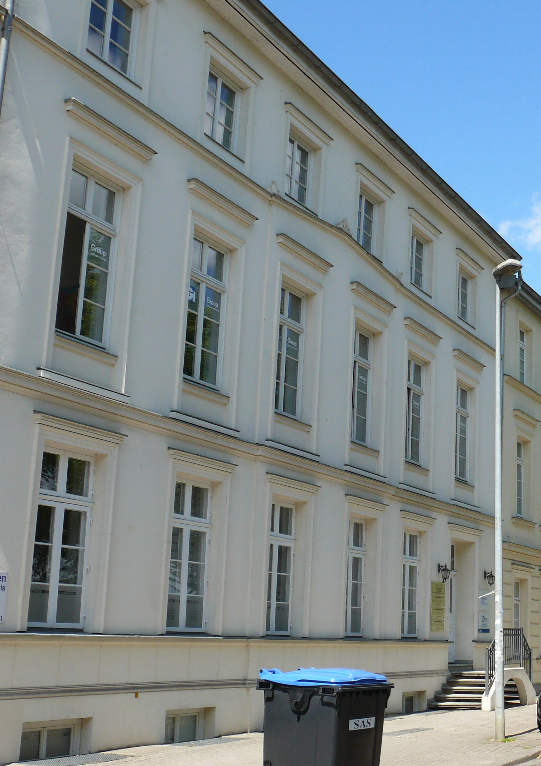 Das denkmalgeschützte Gebäude "Alexandrinenstraße 2" in Schwerin, Mecklenburg-Vorpommern.